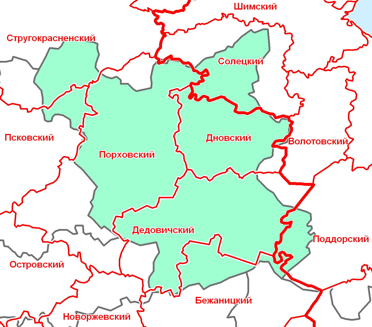 Порховский уезд Псковской губернии в современной сетке районов